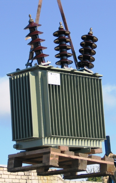 Kõrgepingetrafo